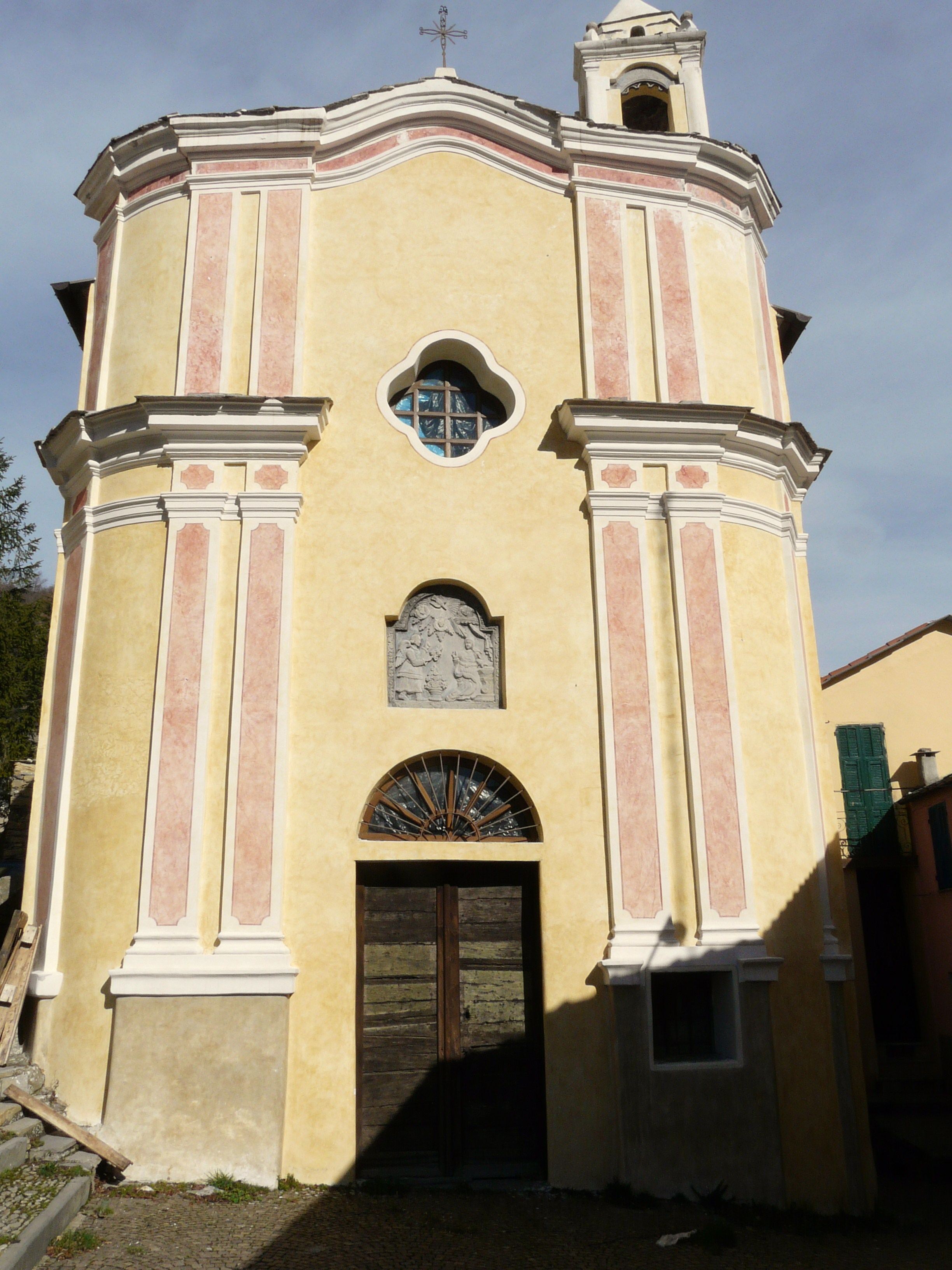 Oratorio dell'Assunta, Carpasio, Liguria, Italia